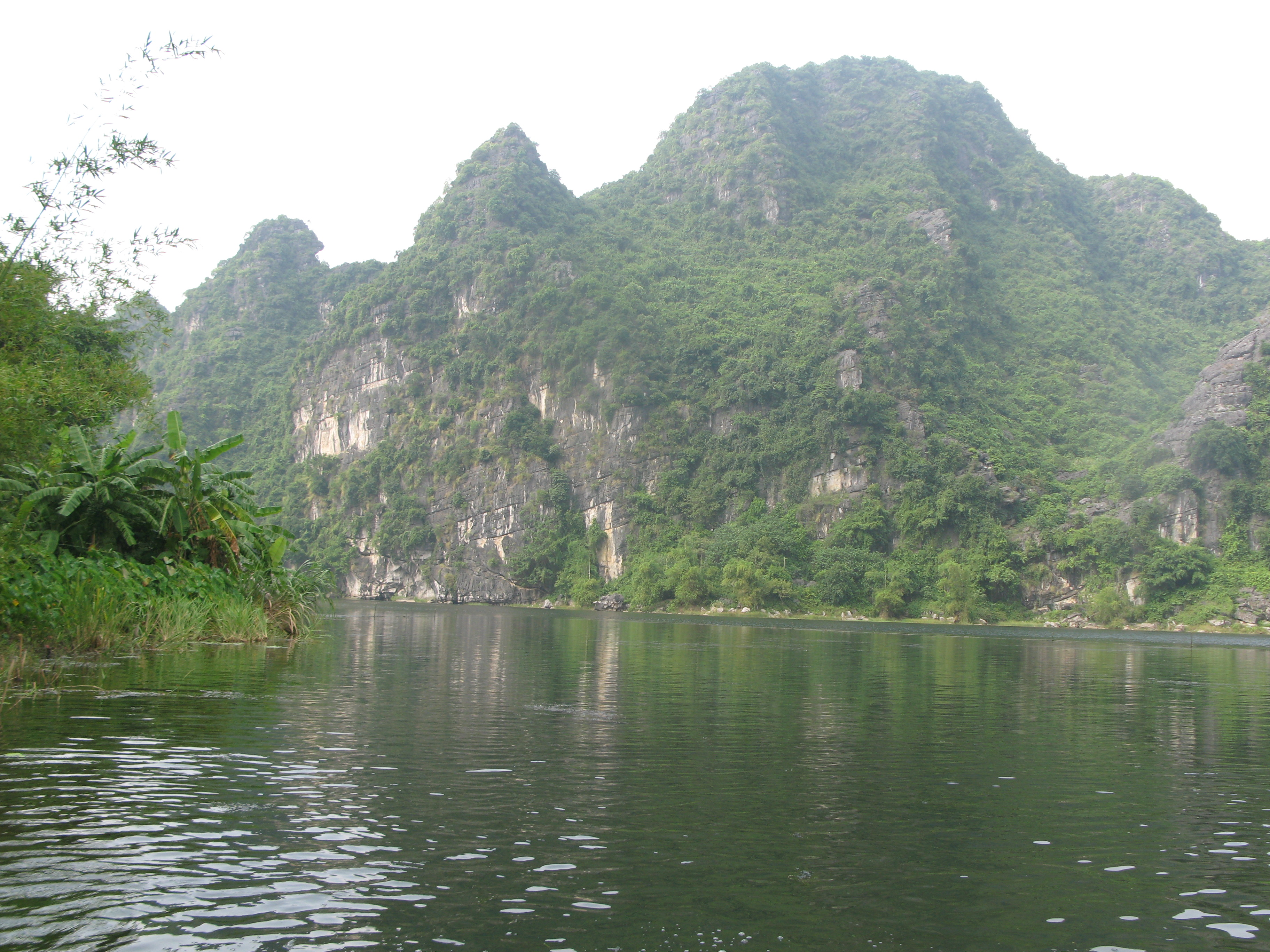 Phong cảnh núi sông đoạn từ Đền Trình đến hang Địa Linh, Khu du lịch Tràng An, Ninh Bình. Tour du lịch bằng thuyền nan kéo dài 3 giờ qua: Bến đò - Đền Trình - Hang Địa Linh - Hang Tối - Hang Sáng - Hang Đền Trần - Đền Trần - qua lại Hang Đền Trần - Hang Si - Hang Sính - Hang Tình - Hang Ba Giọt - Hang Nấu Rượu - Phủ Khống - Hang Phủ Khống - Hang Trần - Hang Quy Hậu - Bến đò (qua 12 hang khác nhau và 3 đền).